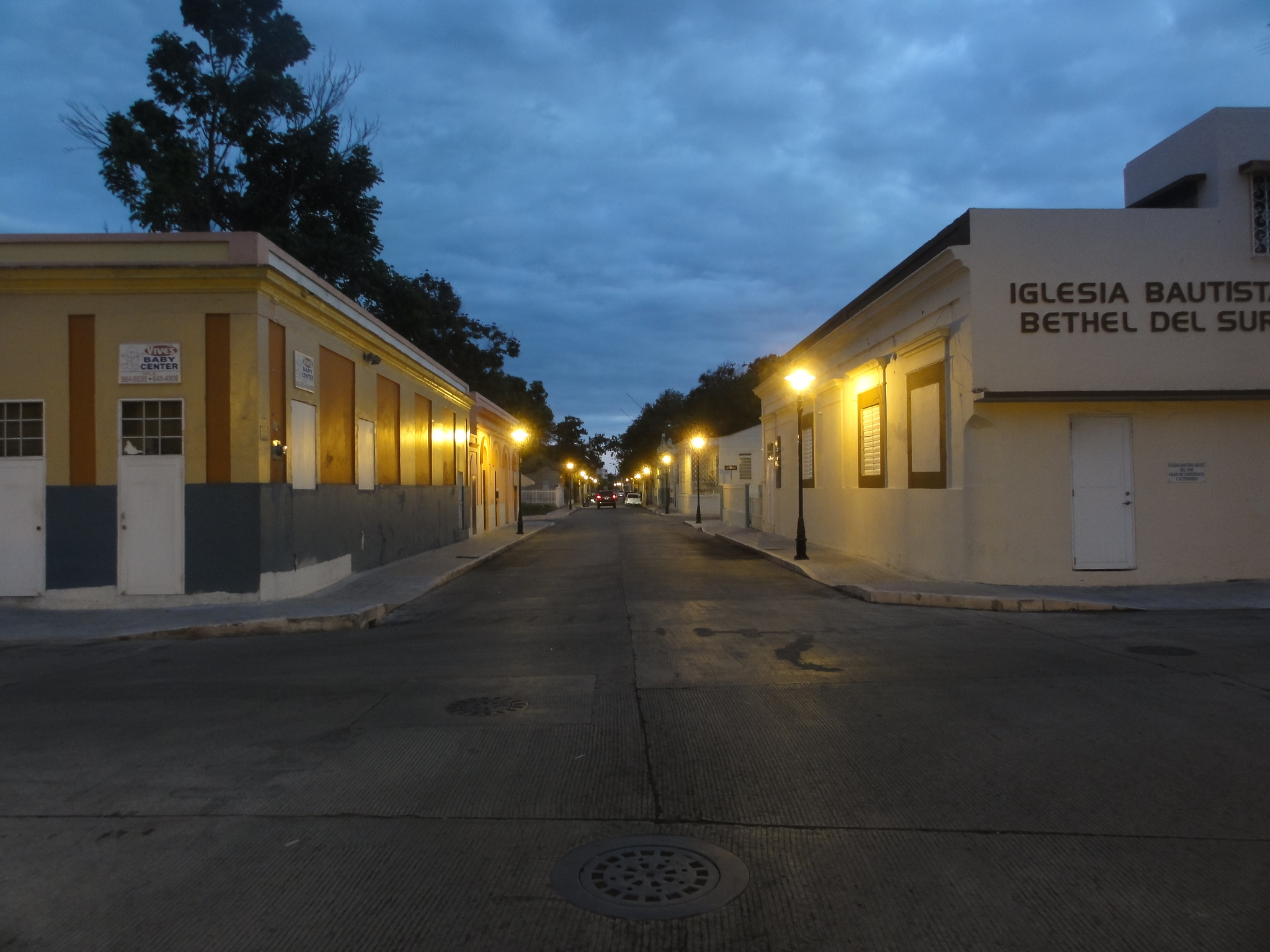 Una calle durante el anochecer en el Barrio Segundo, y dentro de la Zona Historica de Ponce, Ponce, Puerto Rico